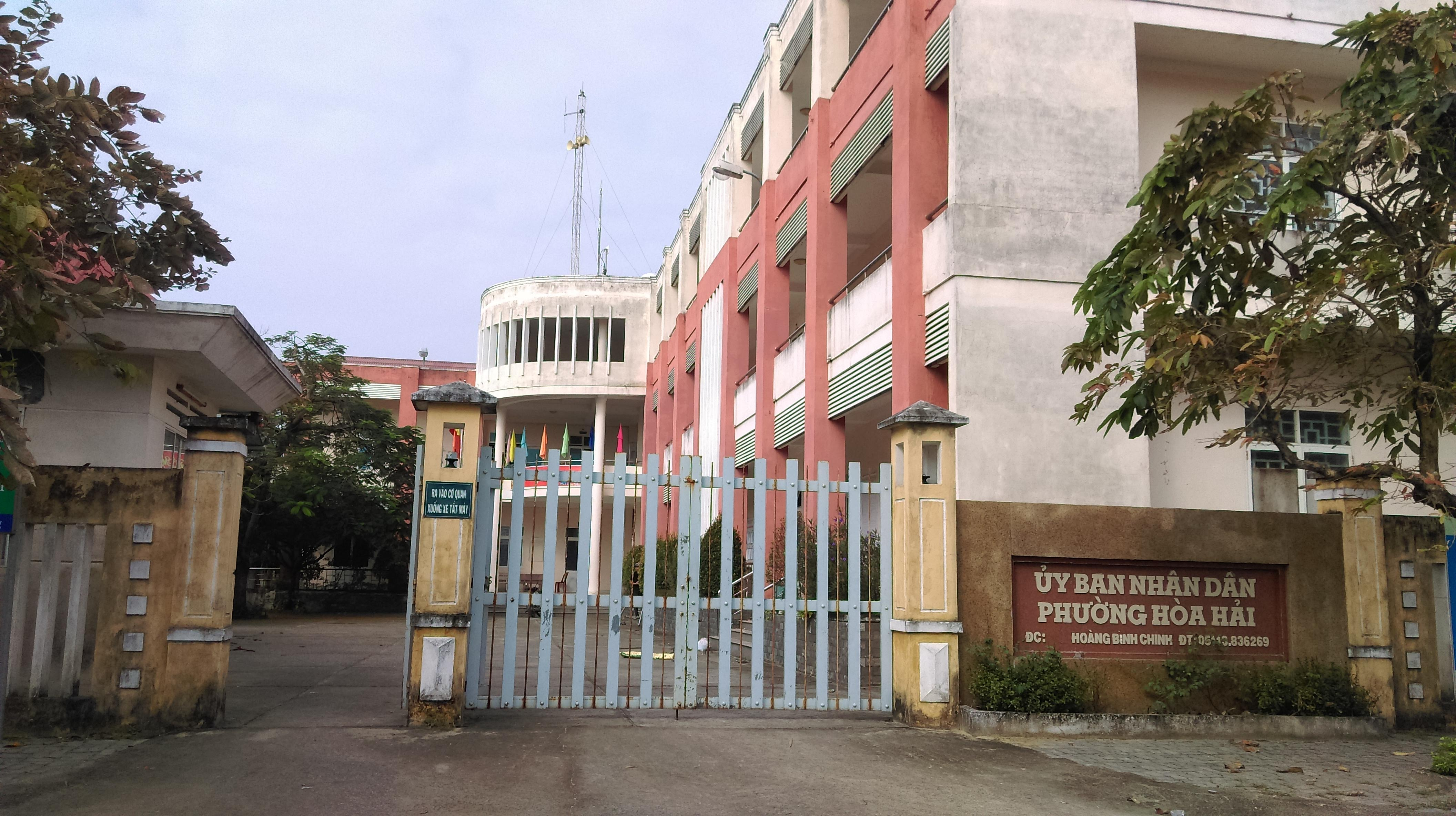 UBND phường Hòa Hải, Ngũ Hành Sơn, Đà Nẵng